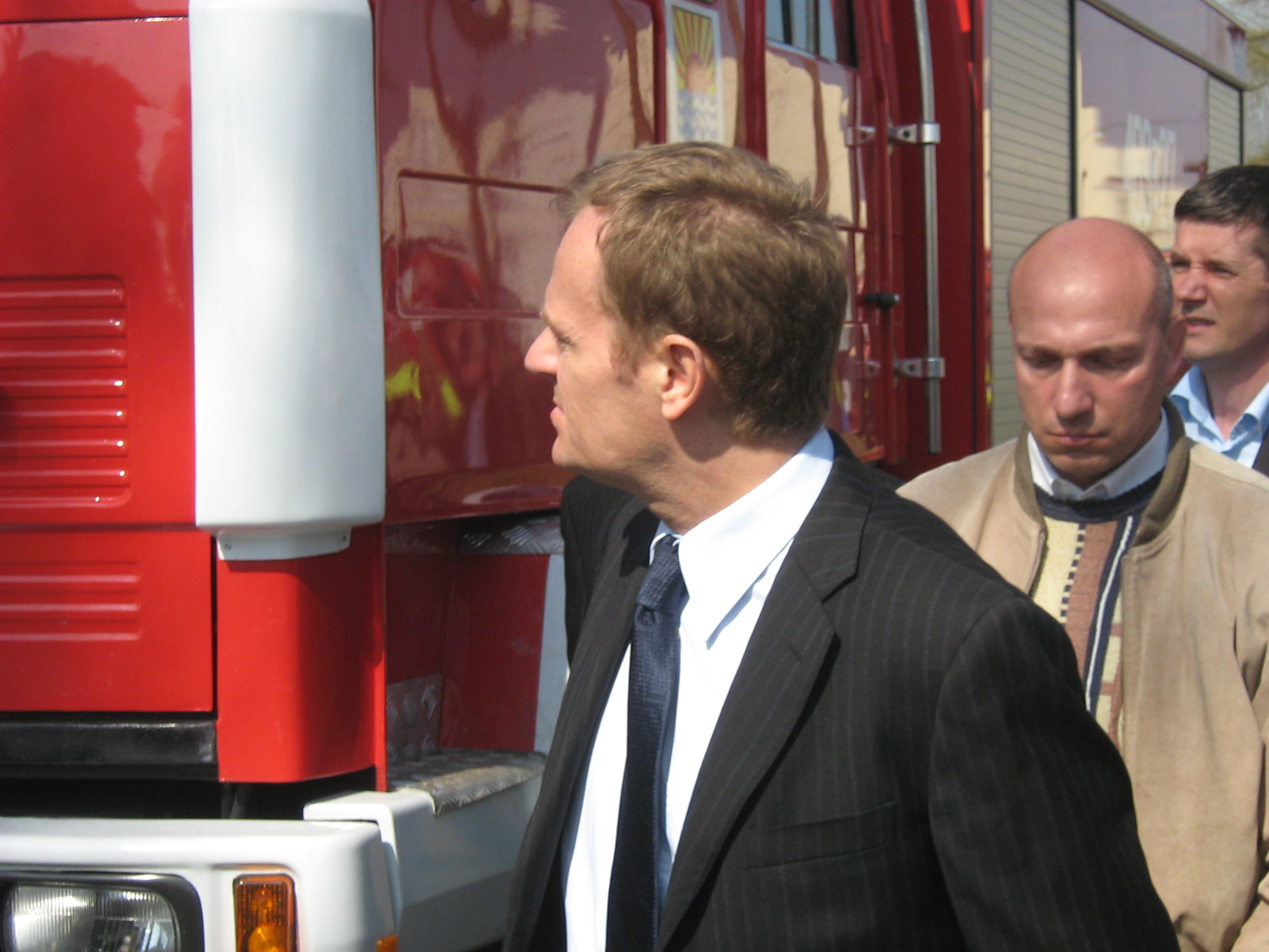 Pożar hotelu socjalnego w Kamieniu Pomorskim